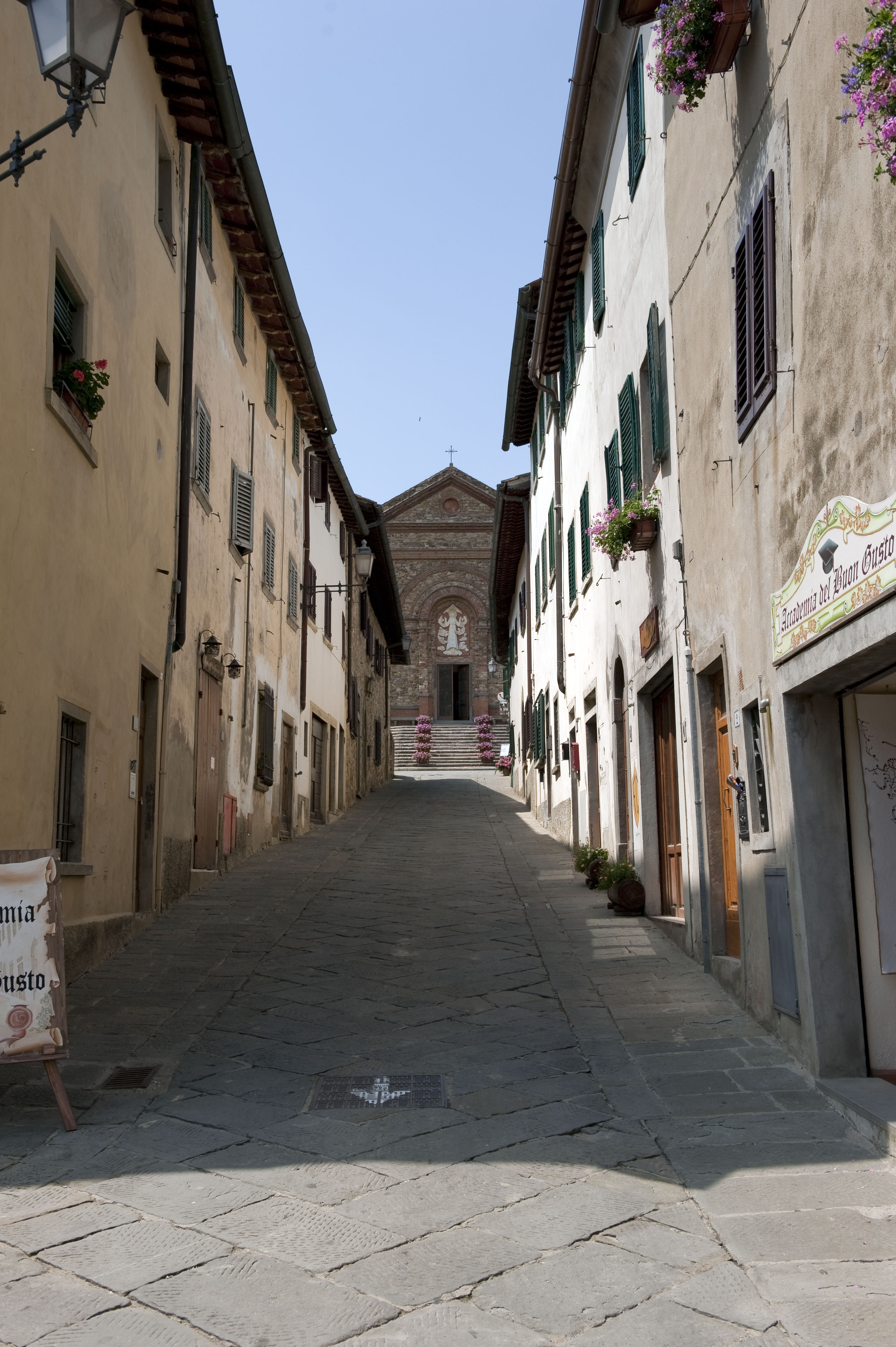 Via principale di Panzano Alto, Panzano in Chianti